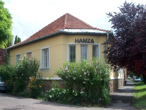 A Hamza Múzeum épülete Jászberényben